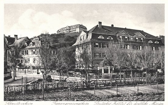 Tübingen. Drei zusammenhängende Gebäude: oben Tropengenesungsheim, unten rechts Deutsches Institut für ärztliche Mission (der Träger des Tropengenesungsheimes) in der Nauklerstraße 47 [seit dem Auszug von DIfÄM wurde dieses Gebäude für verschiedene Zwecke verwendet, u.a. als Sitz des Regierungspräsidiums Tübingen] und links das Schwesternheim des Tropengenesungsheimes in der Mohlstraße 18 [dieses Gebäude ist heute der Sitz des Instituts für Donauschwäbische Geschichte und Landeskunde]. Echte-Photographie-Ansichtskarte aus dem Stuttgarter Verlag A. Weber.